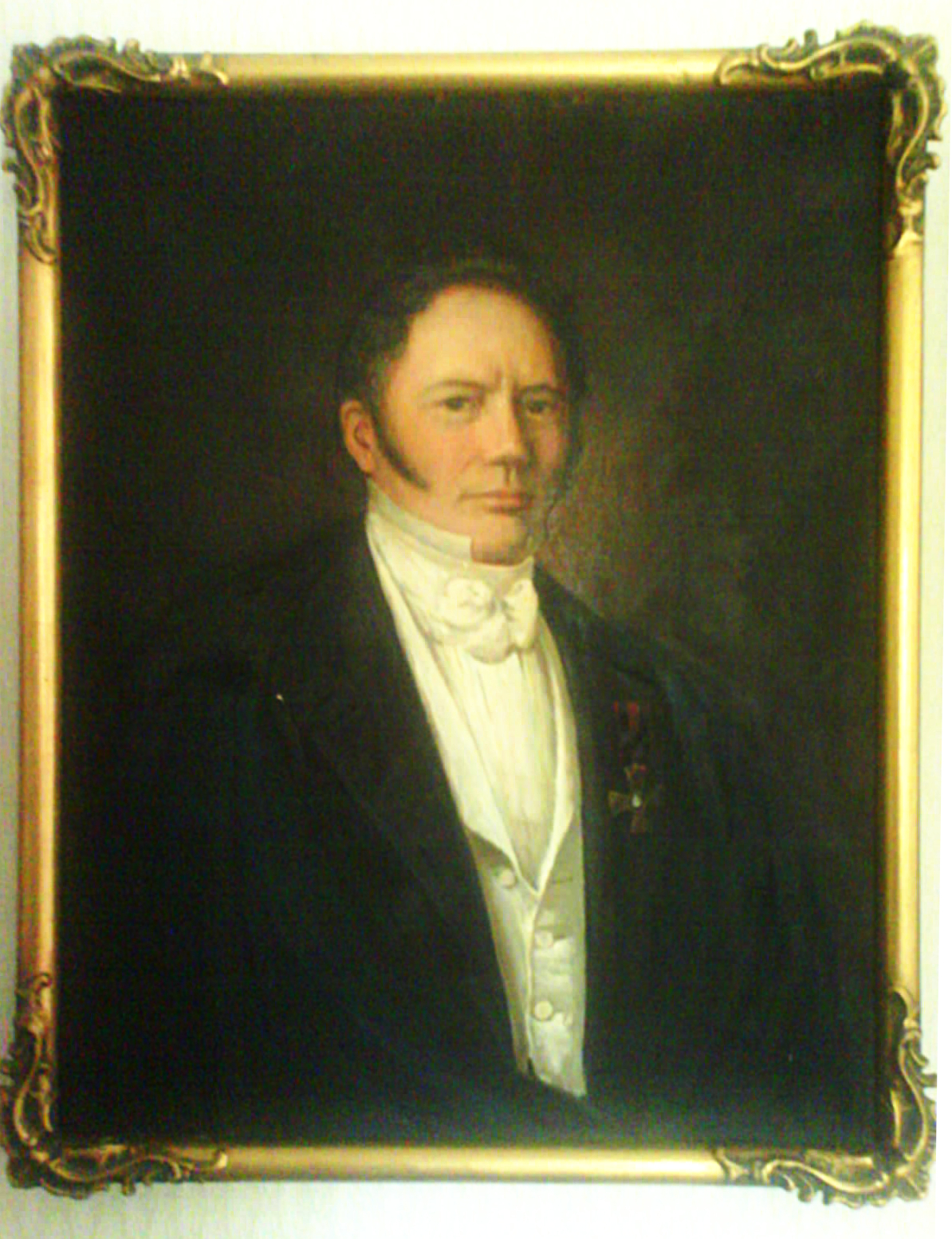 Foto av porträtt